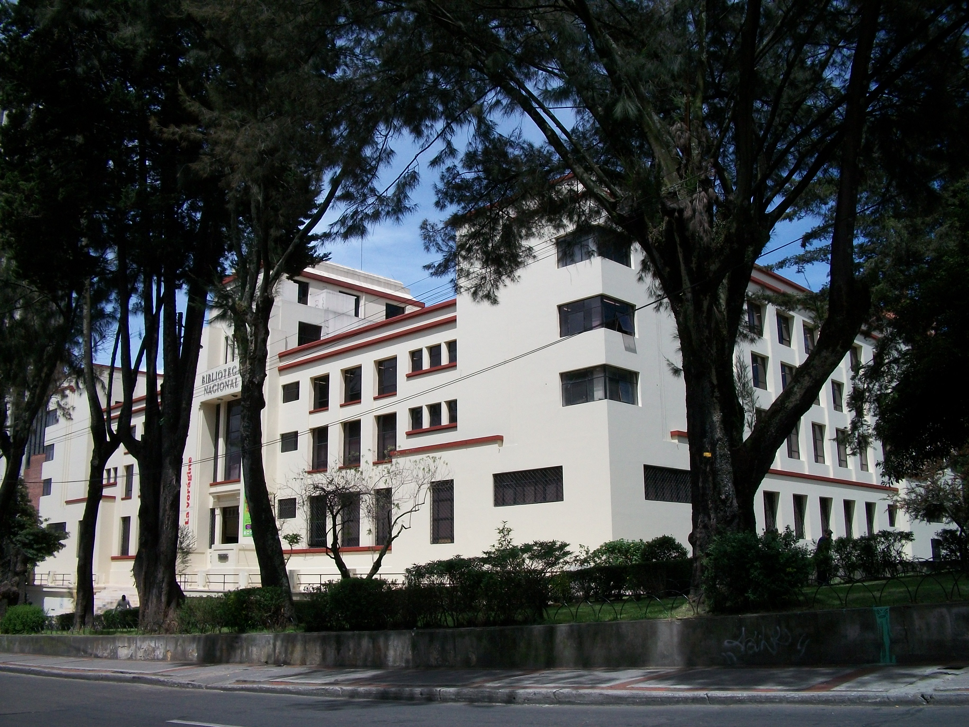 Biblioteca Nacional en bogotá, carrera Quinta con calle Veinticuatro.